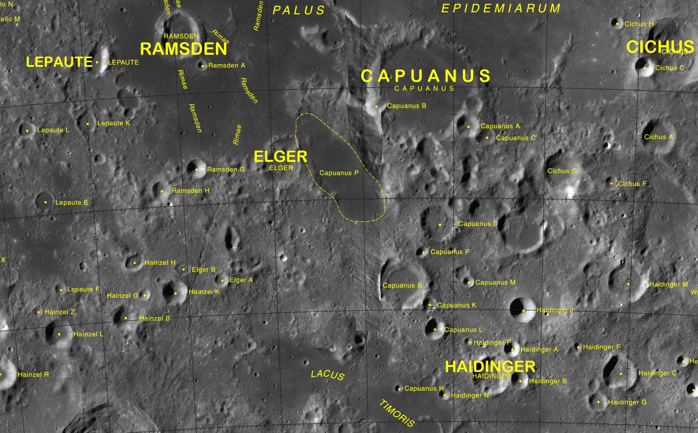 Cráter lunar Elger. Localización. (Imagen LROC)